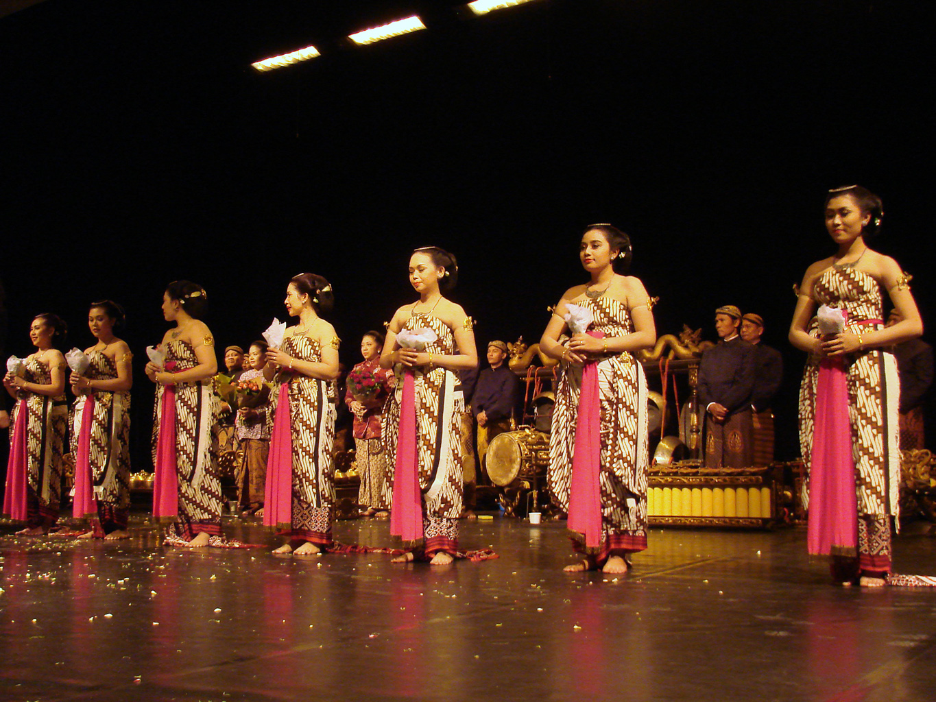 BEDHOYO Ballet du kraton de Surakarta Indonésie Sous la direction de Son Altesse Royale G.R.Ay Koes Moertiyah Wandansari Direction musicale Rahayu Supanggah Gamelan Garasi Seni Benawa Production : Maison des cultures du monde Spectacle à l'Opéra Bastille